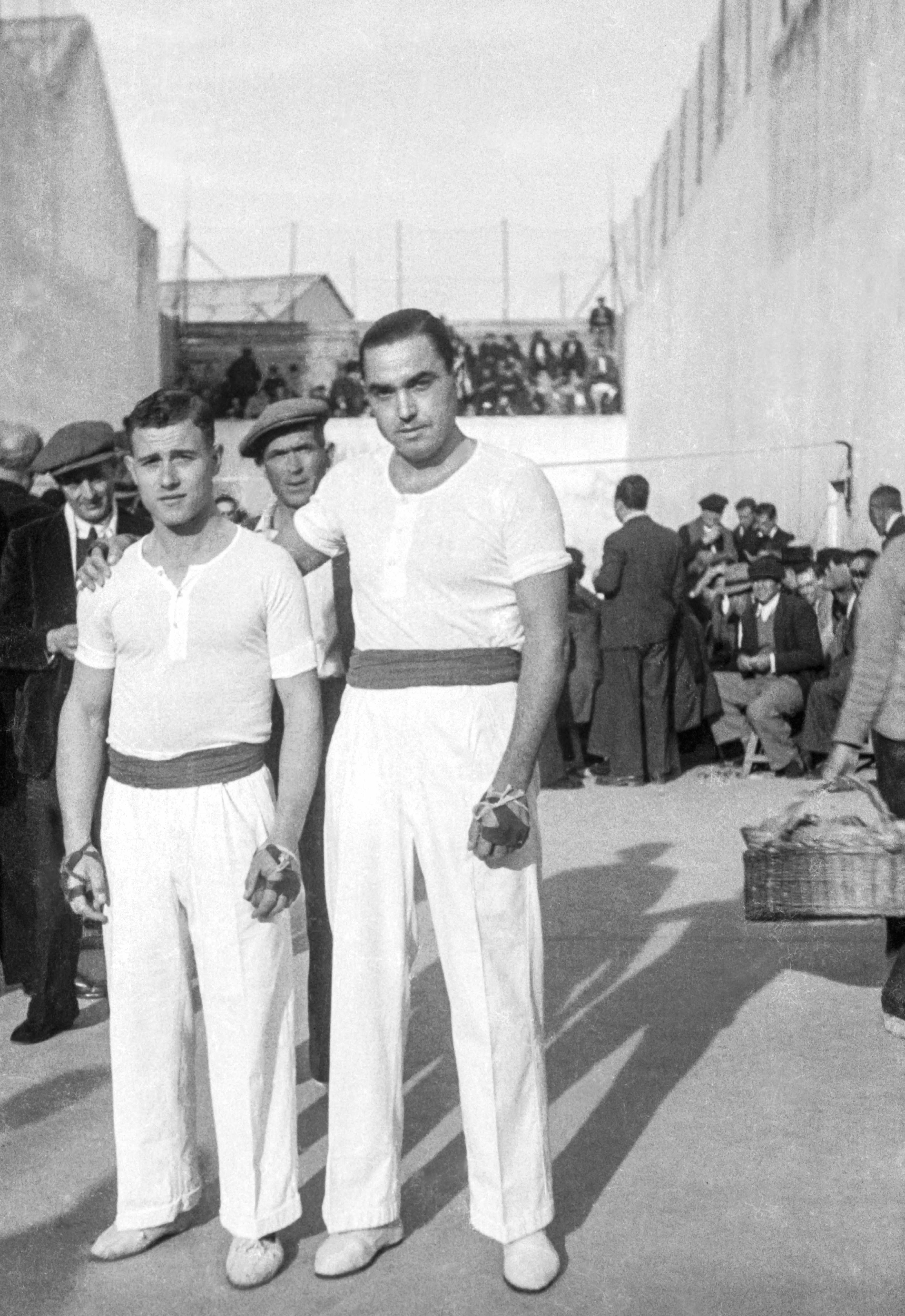 L'Arxiu allibera avui aquesta imatge de Juliet el pilotari i del Xiquet de Quart, feta per Ismael Latorre Mendoza el 24-11-1946, en el Trinquet d'Alginet. Julio Palau Lozano i Albert Arnal Navarro, són dos dels més grans pilotaris valencians d'Escala i corda. Tenen foto penjada a la Galeria d'Honor del Trinquet de Pelayo (València). Aquesta fotografia ha estat exposada en diverses ocasions a Alginet pel mateix autor. L'Arxiu conserva 15 negatius de la pilota valenciana amb data 24-11-1946. De la mateixa carpeta de negatius i de la mateixa partida es va publicar: La imatge Juliet, el tio Toles i Xiquet de Quart a: Fornés, Alberto; Císcar, José i Latorre, Ismael: Alginet, històries, costums i altres relats, Societat Cultural Alèdua, Alginet, 2003. Dipòsit Legal: V-2546-2003, a la pàgina 152. La imatge Jugant al trinquet d'Alginet va ser editada pel Museu de la Pilota el Genovés a una invitació amb motiu d'una exposició sobre la pilota d'Ismael Latorre el 15 de maig del 2009. Al programa d'actes figurava: 20:00h Inauguració i parlaments; 20:30h Signatura llibre d'Honor; i 21:00h Xerrada Retrospectiva de la pilota, a càrrec de Rafa Jordan. A més d'aquestes exposicions, part de la imatge avui alliberada a Wiquimedia Commons és utilitzada per La Diputació de València (i El Museu Valencià d'Etnologia) des de l'any 2013 a l'apartat: Galeria de Figures, Escala i Corda de l'exposició Faixa roja, faixa blava. La pilota valenciana. El periòdic Levante i diverses webs també han fet ús d'aquesta obra d'Ismael Latorre: "Diputació de València, Museu Valencià d'Etnologia, Exposició:Faixa roja, faixa blava. La pilota valenciana" Levante, Juliet, un jugador providencial 10-10-2015 elmicaletdelapilota Mitos Escala i corda Quart de Poblet: història i patrimoni Treball digital: Carolina Latorre Canet